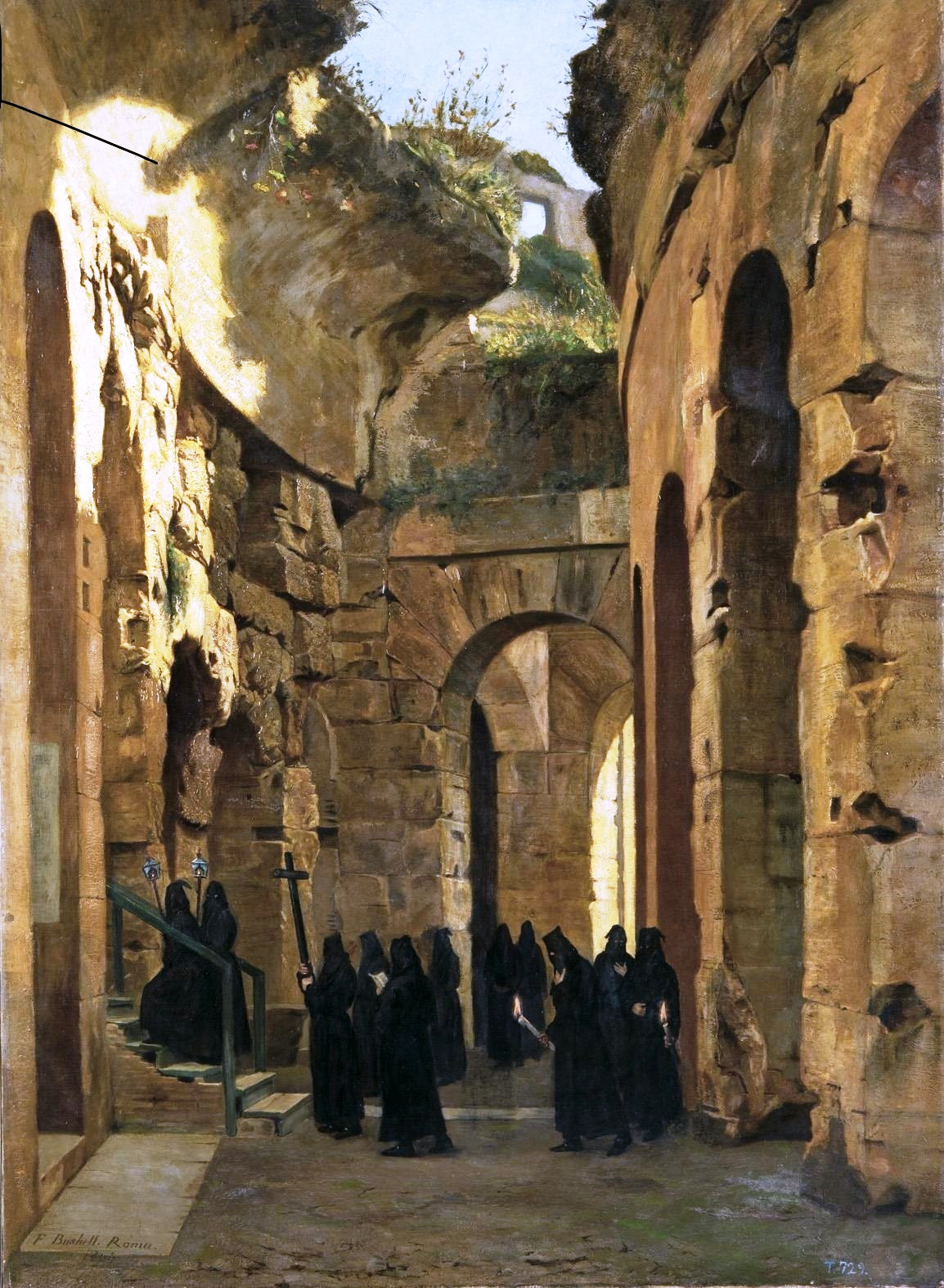 La obra representa el paso de una procesión por el interior del Anfiteatro Flavio de la ciudad de Roma, más conocido como el Coliseo.